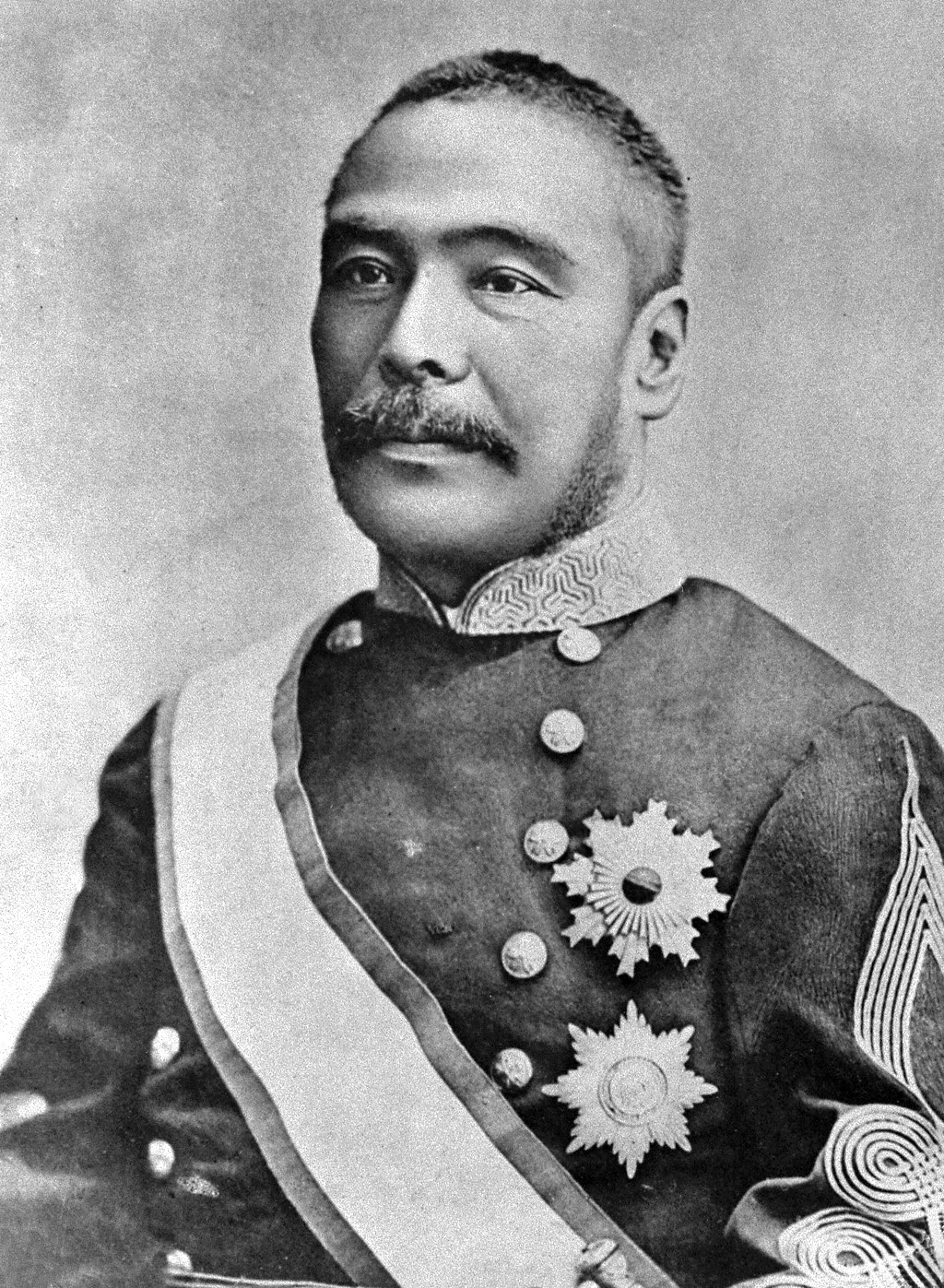 Portrait of Kuroda Kiyotaka (黒田清隆, 1840 – 1900)